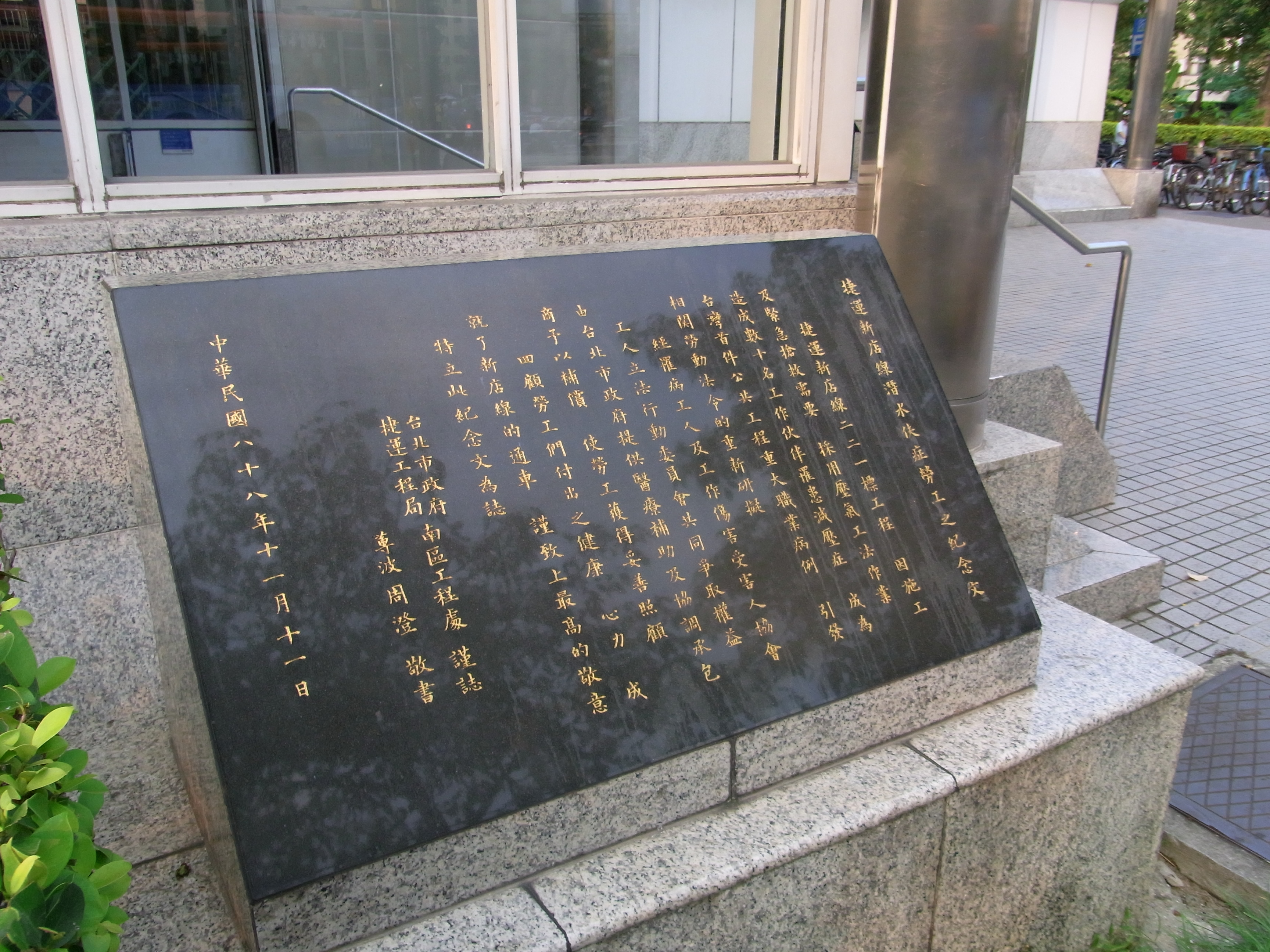 台北捷運台電大樓站潛水伕症勞工紀念碑，1999年11月11日台北市政府捷運工程局南區工程處立碑，周澄書。